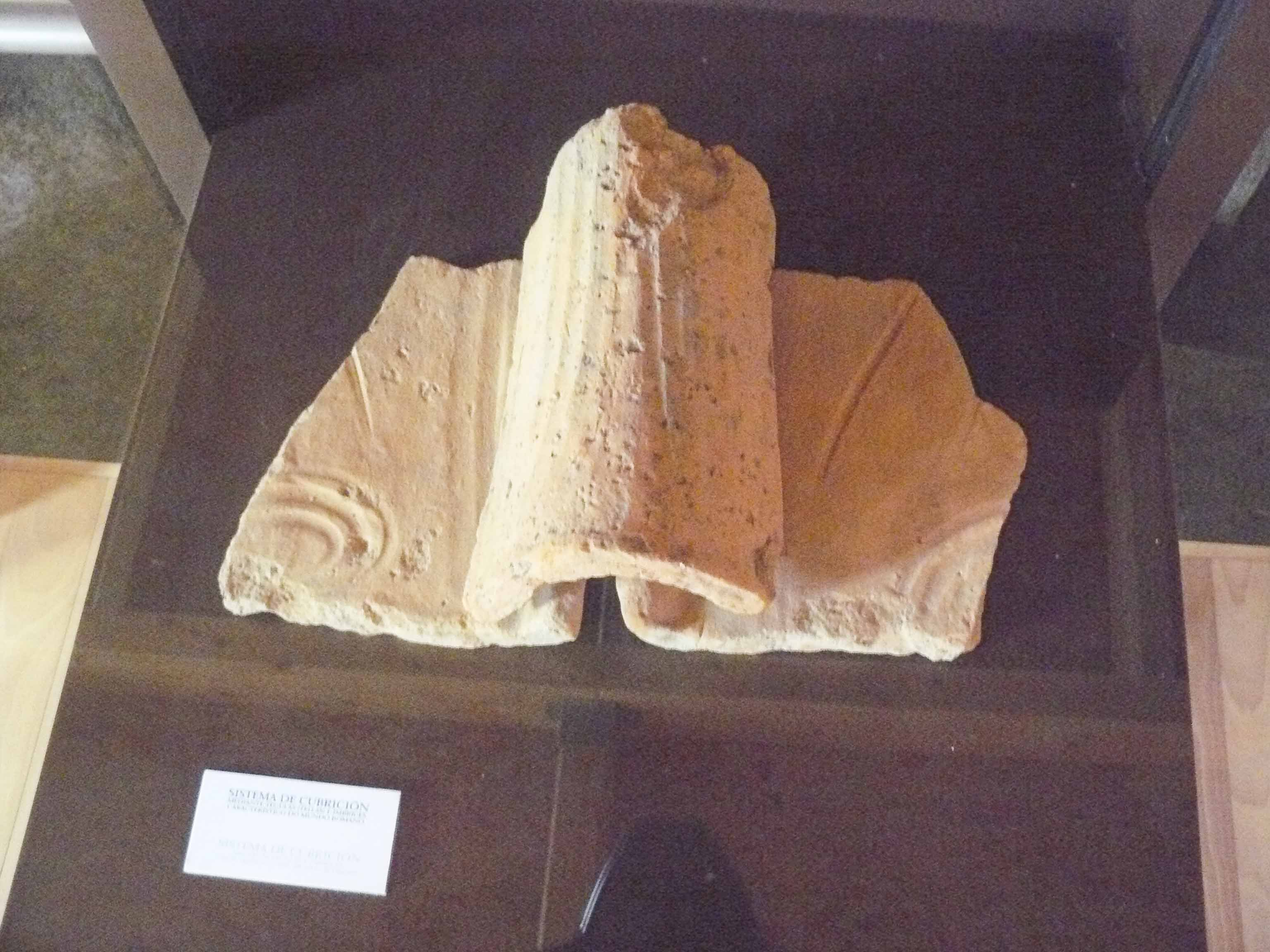 Restos de cubrición (tégulas) na vila romana de Cambre